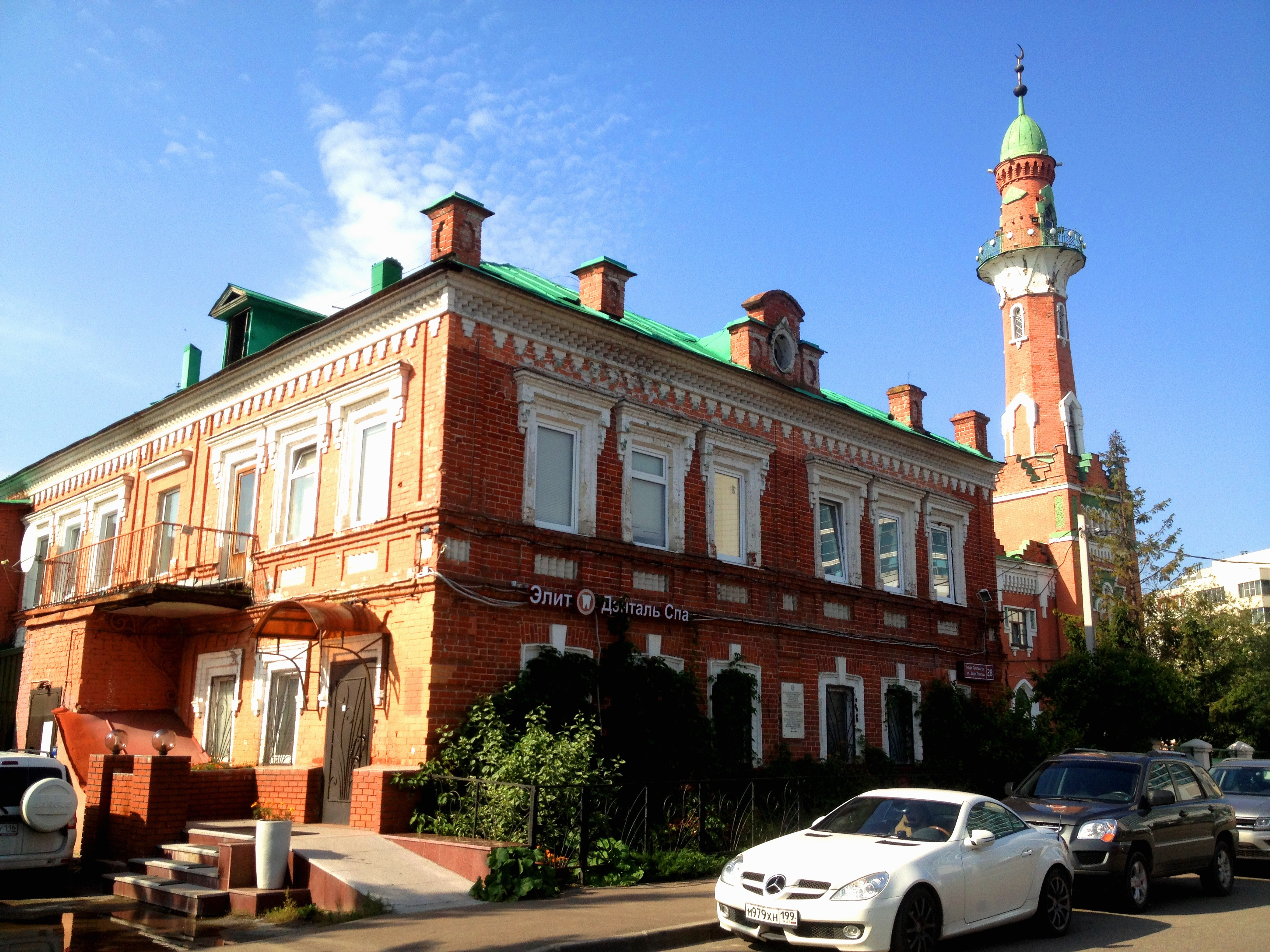 Дом, в котором располагался в период формирования штаб 120 стрелковой дивизии: улица Хут. Такташа, 28, Казань, Татарстан